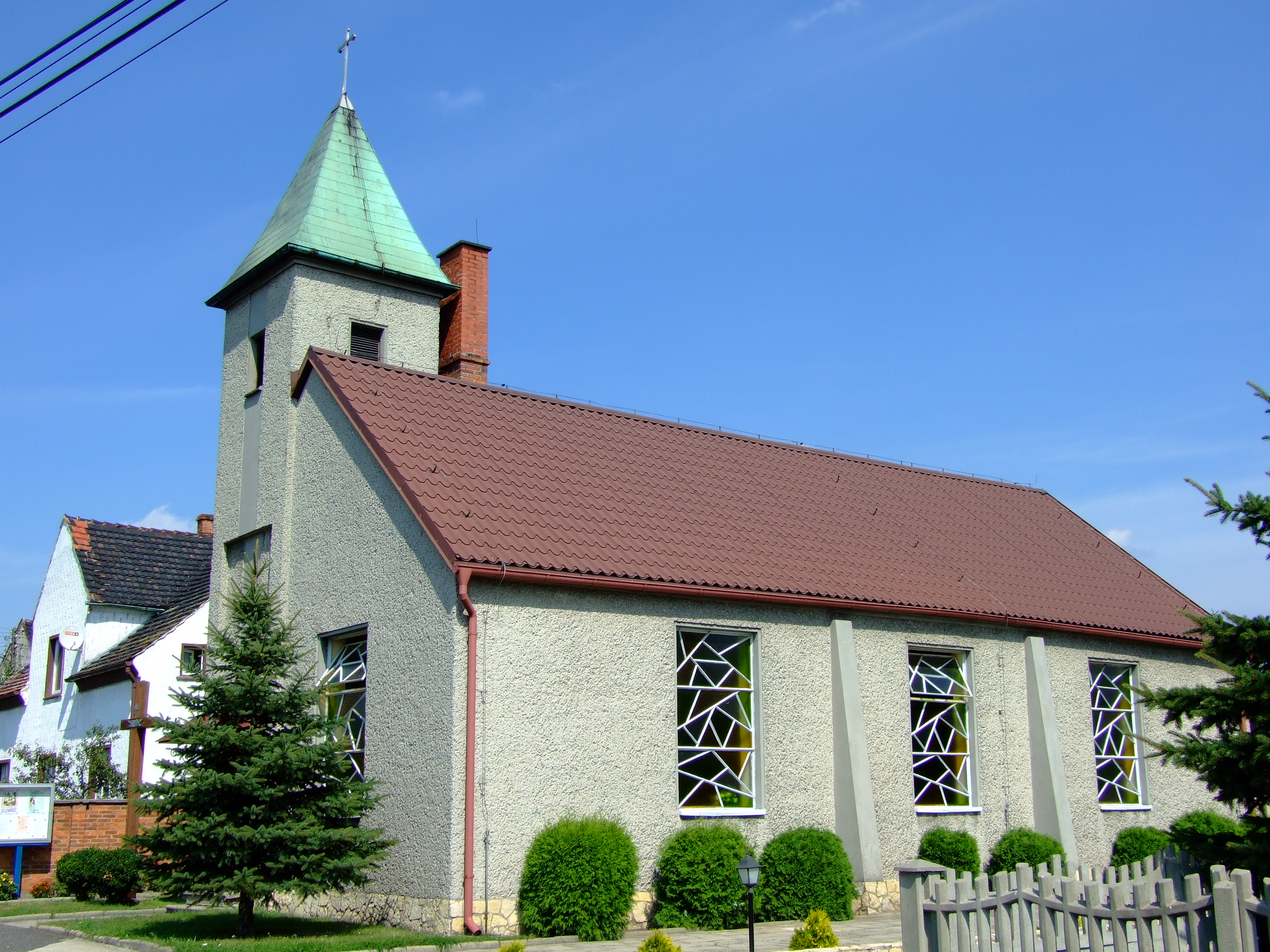 Kościół Matki Boskiej Różańcowej w Rzeczycach (województwo śląskie)